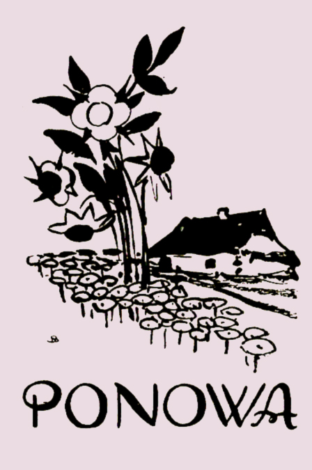 "Ponowa" 1921, nr 1, okładka, rys. Stanisław Noakowski